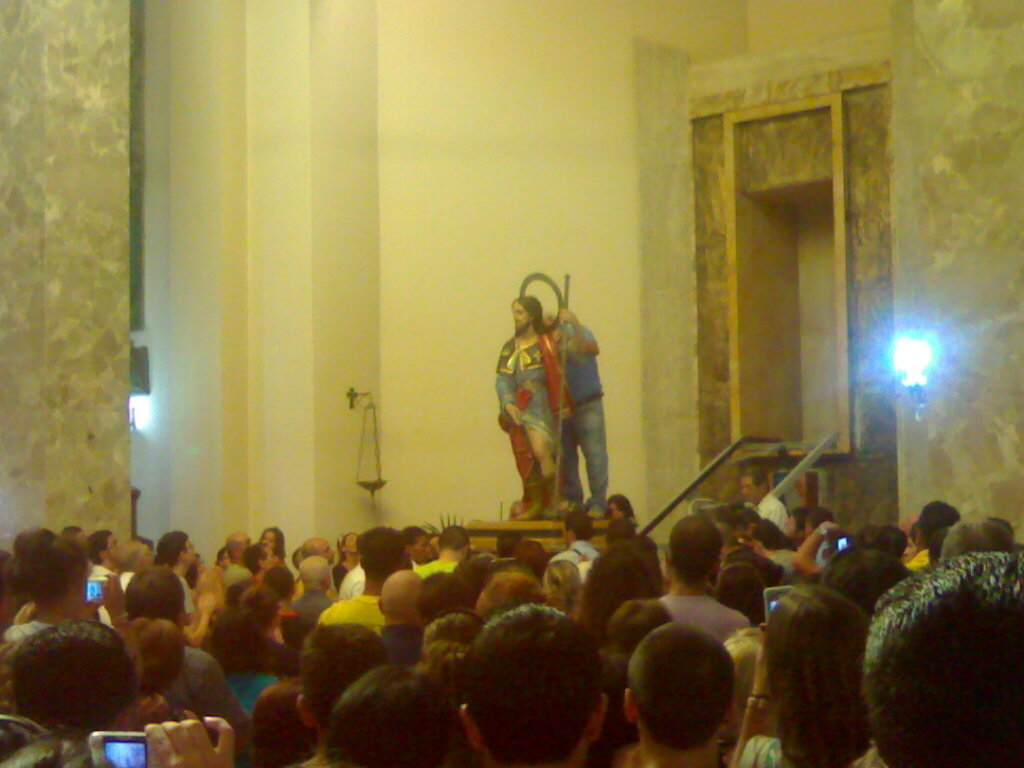 Palmi. 12 agosto, calata di san Rocco